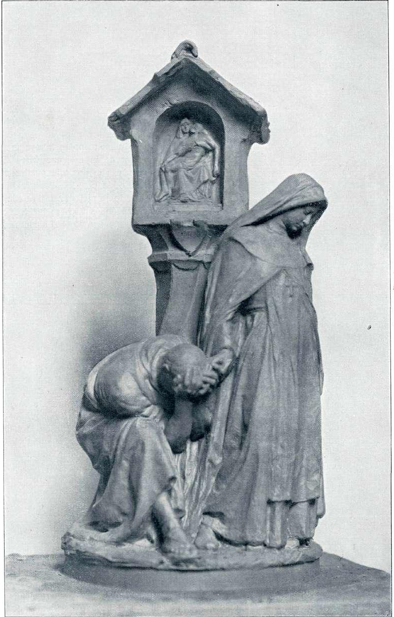 Absolvo te.